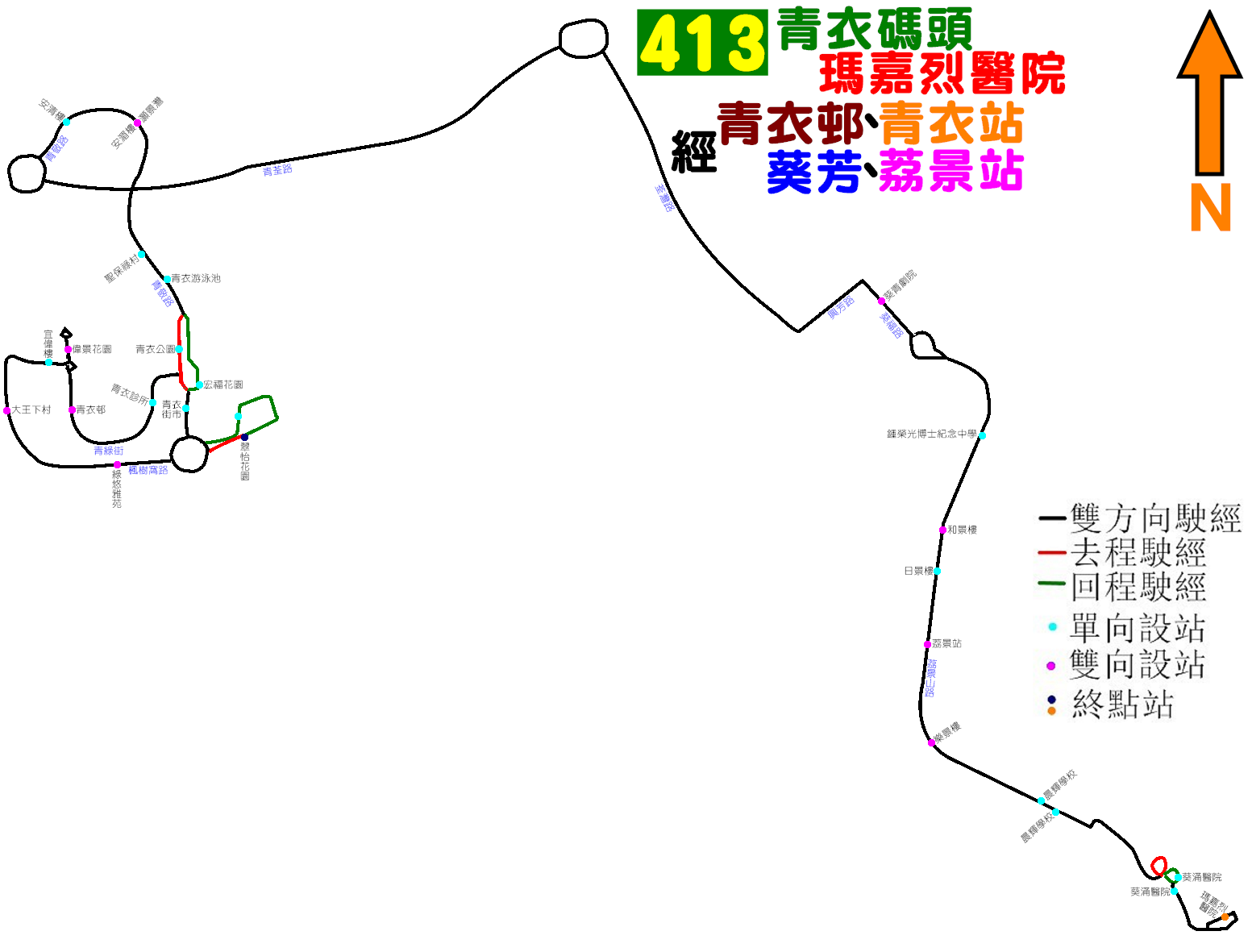 新界專線小巴413線的走線圖